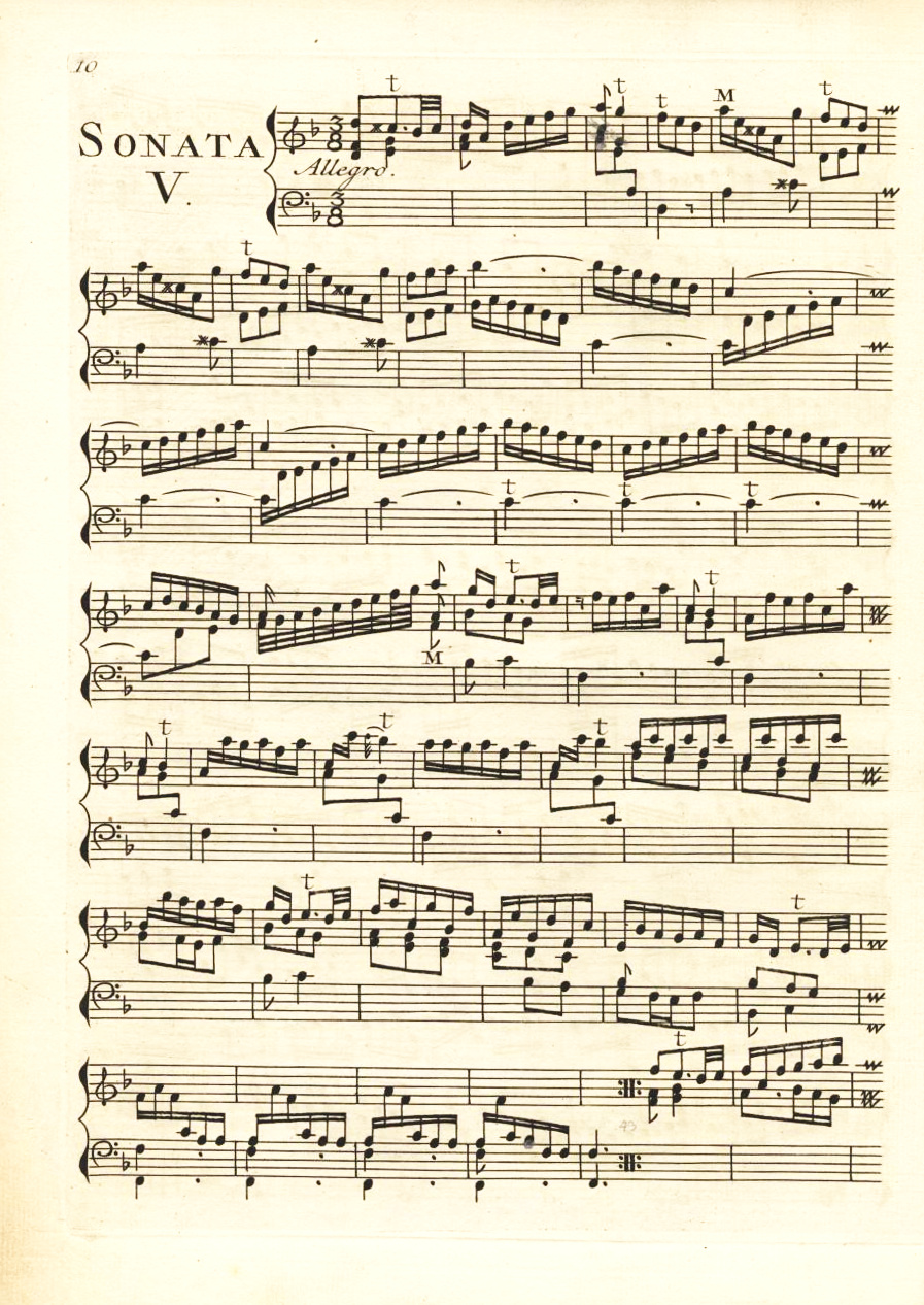 La sonate K. 5, dans une édition des Essercizi per gravicembalo, publiés à Amsterdam en 1742.